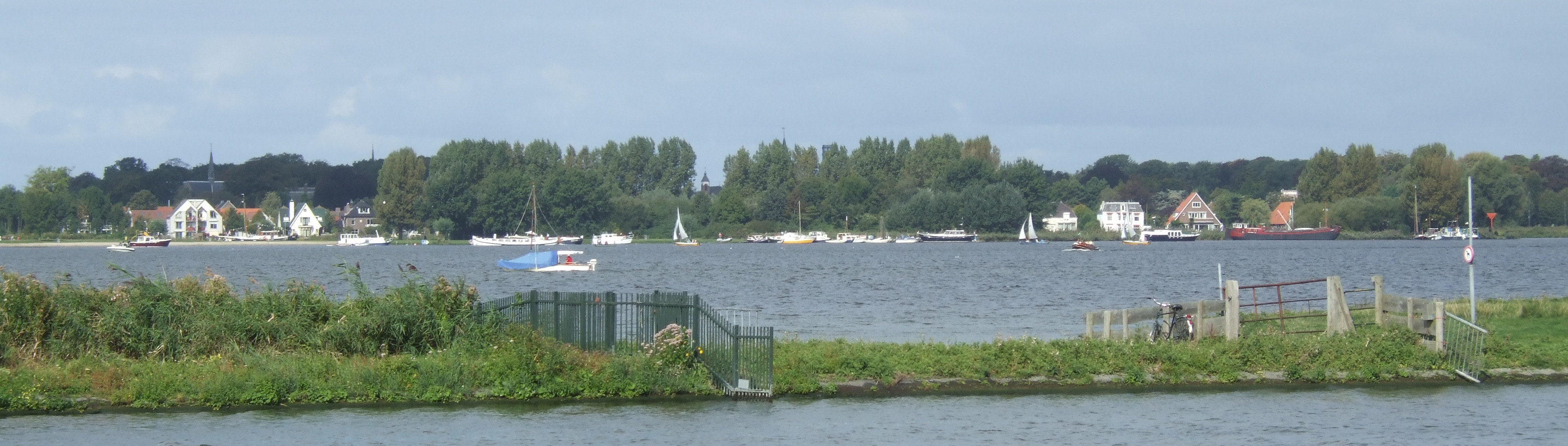 Warmond vanaf de Kagerplassen